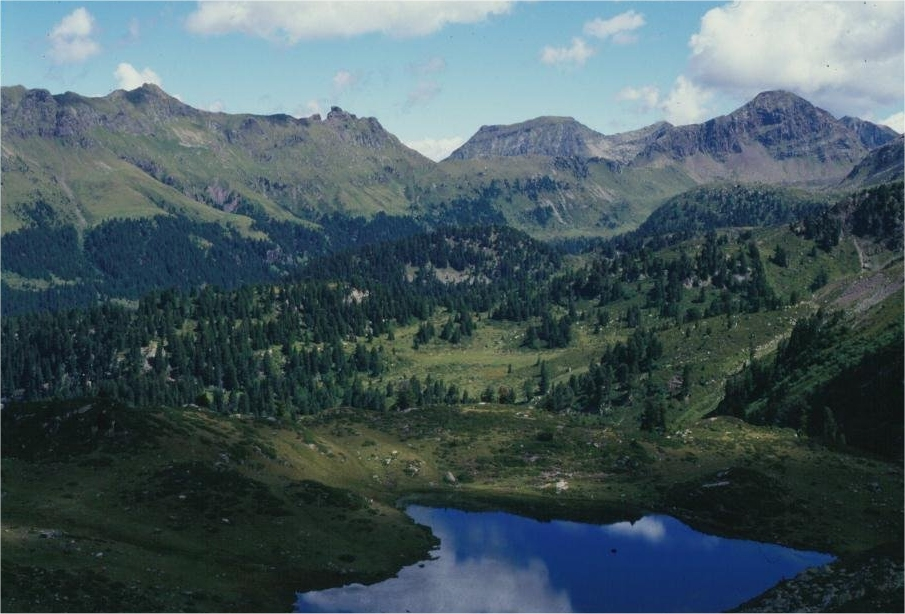 Foto Lagorai Università di Padova